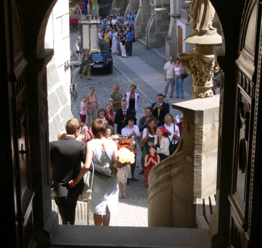 Rathaus Görlitz Rathaustreppe als "Showtreppe" bei einer Hochzeit